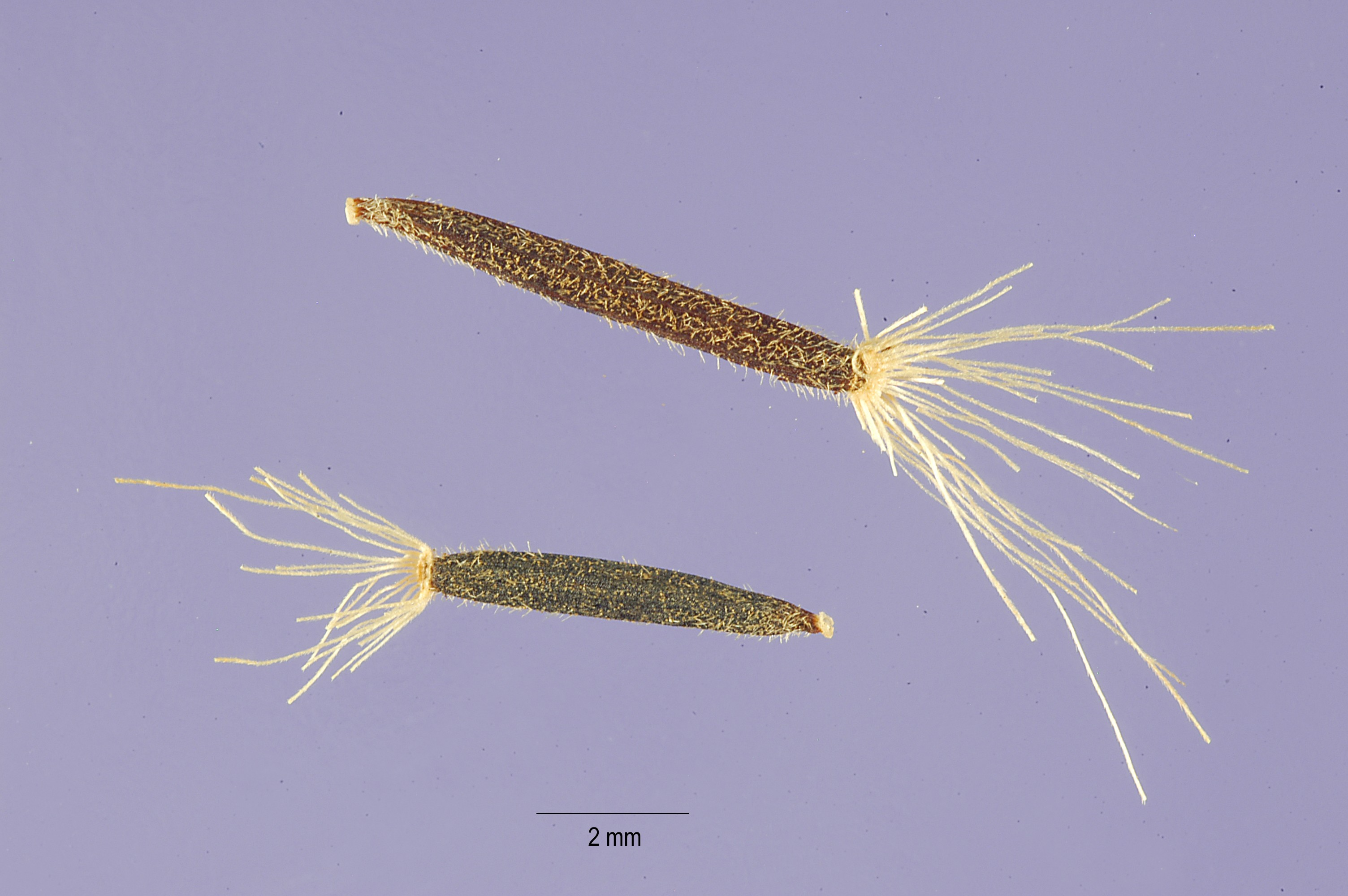 Arnica montana seeds